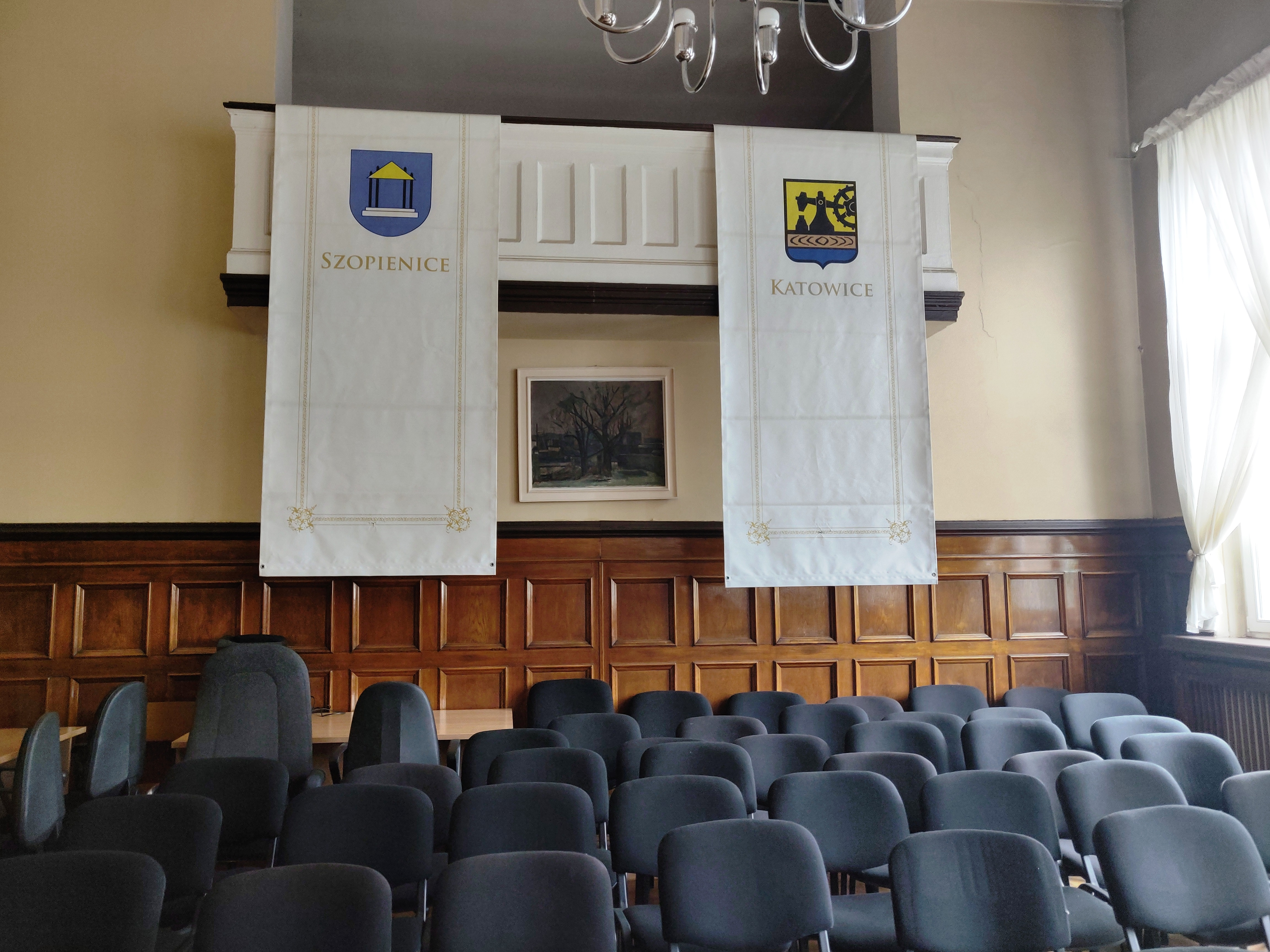 Budynek przy ul. Wiosny Ludów 24 w Katowicach